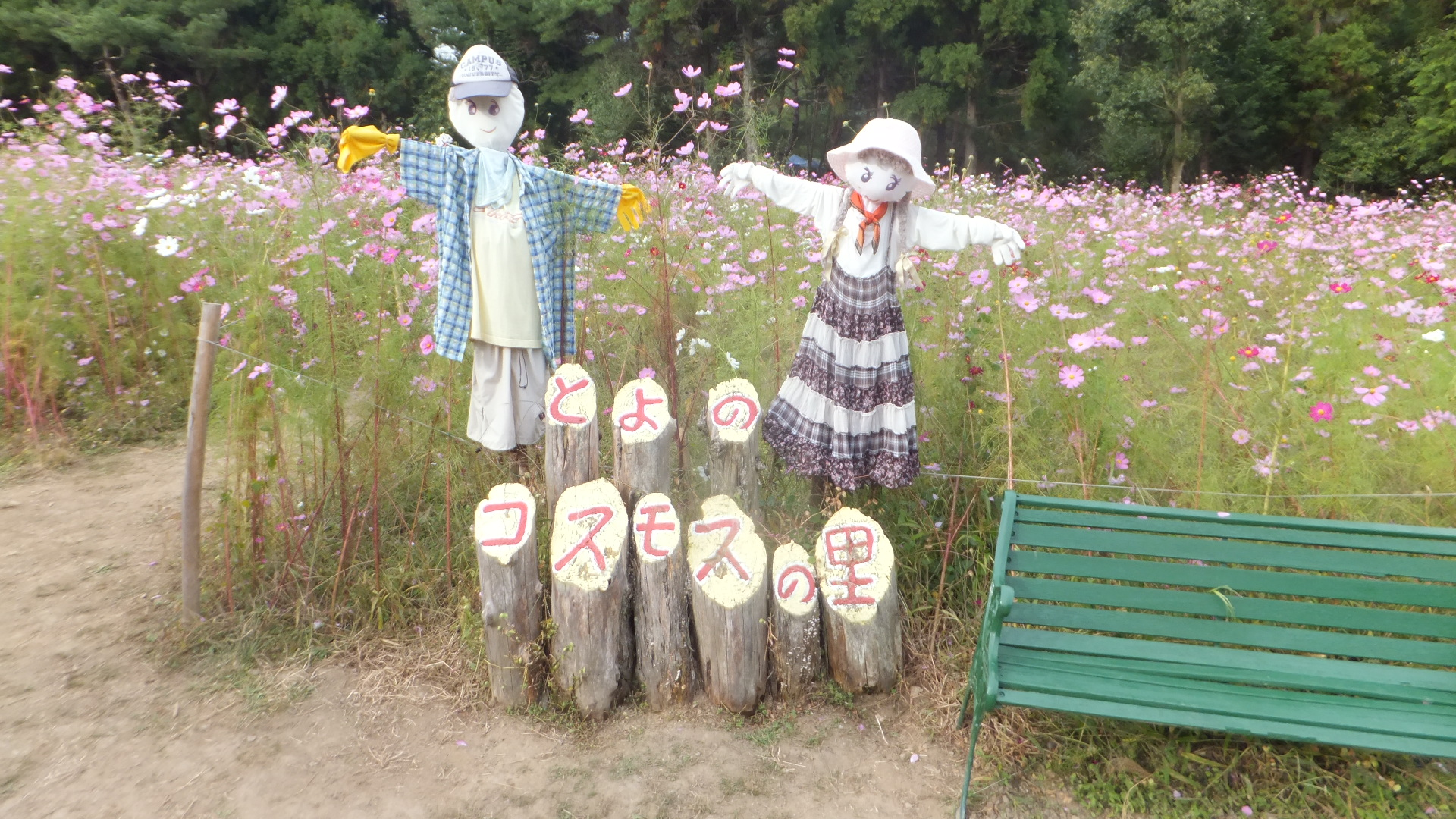 とよのコスモスの里（2015年10月10日）